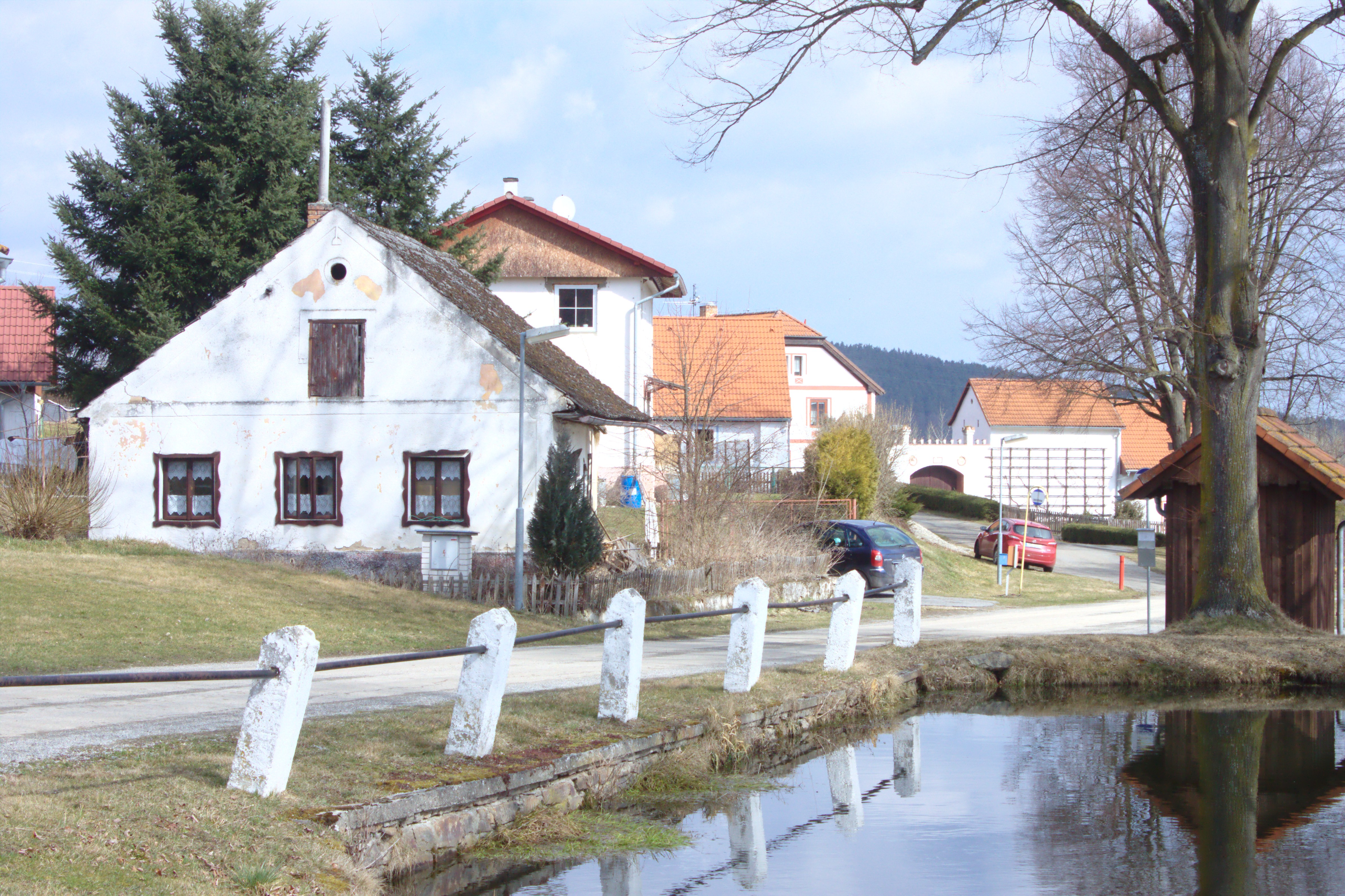 Rybník ve vesnici Ratiborova Lhota Project: Fotíme Česko